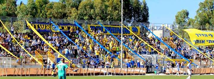 יציע אוהדי עירוני אשדוד במשחק גביע המדינה מול הכח רמת גן.